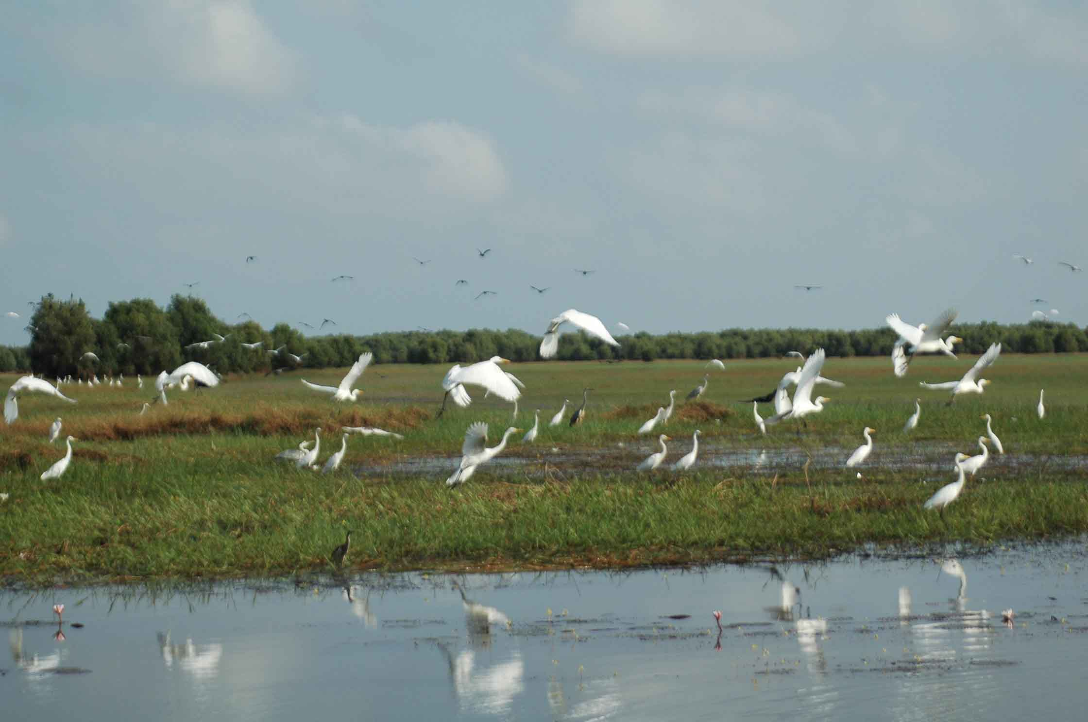 Dồng cỏ ở Tràm Chim